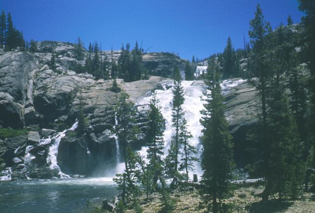 Glen Aulin Falls